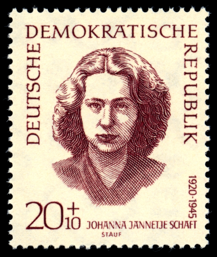 Information: Ausgabepreis: Pfennig First Day of Issue / Erstausgabetag: Auflage: Entwurf: Druckverfahren: Michel-Katalog-Nr: Ländercode-MiNr